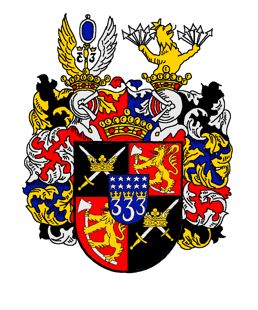 Friherrlig vapen för ätten Rehbinder